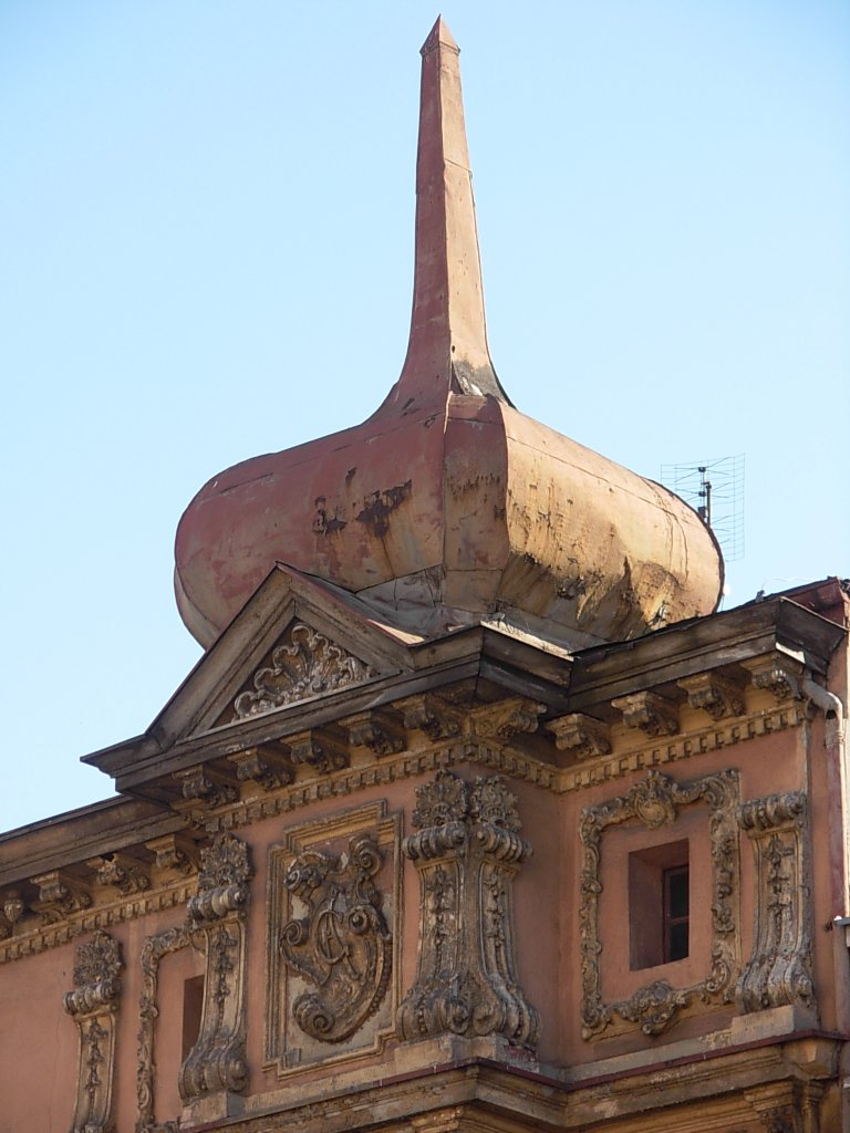 Ulica Dworcowa w Bydgoszczy